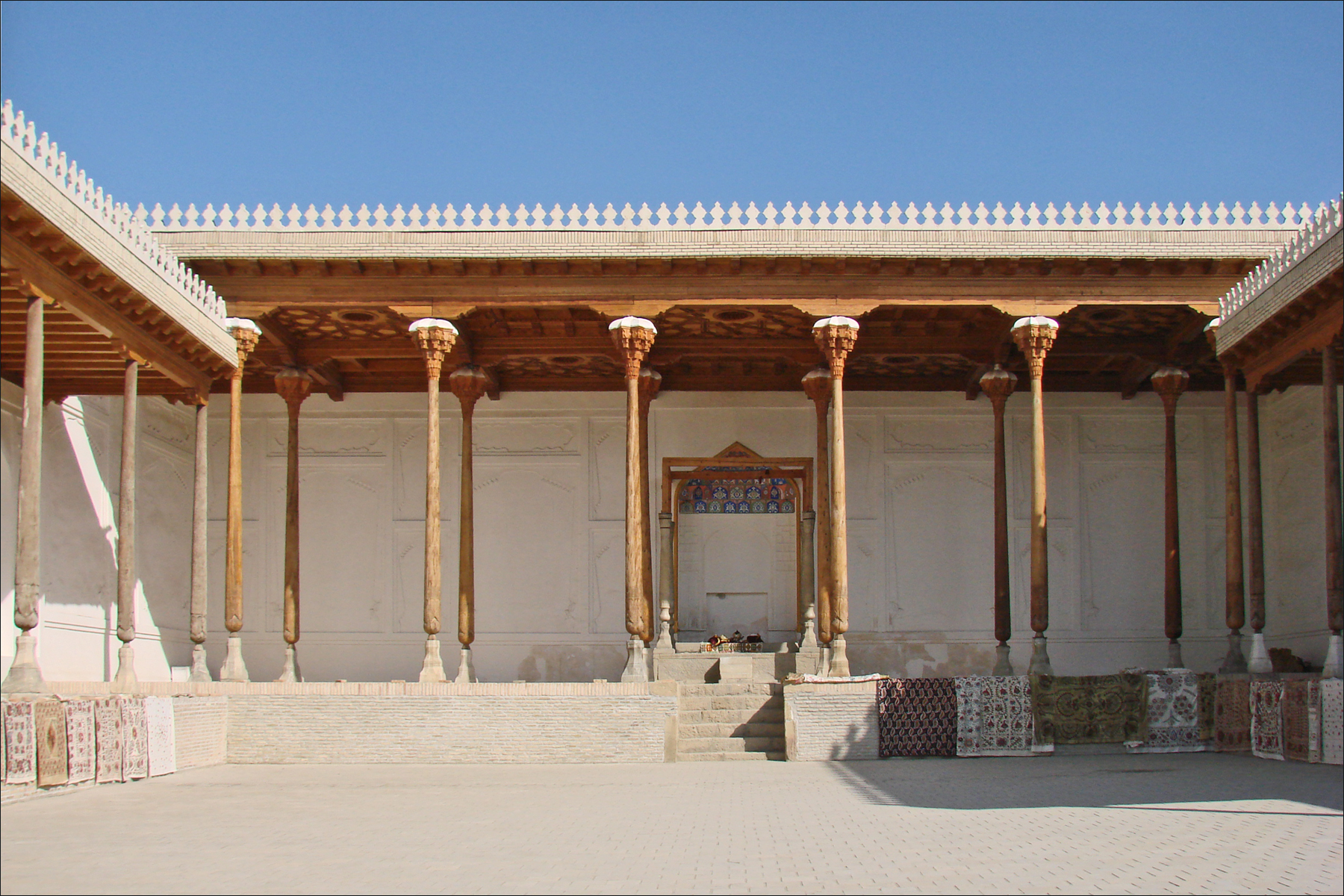 Au sein de l'Ark, la salle du trône était un iwan de bois à trois cotés. Il s'agit d'un espace reconstruit La forteresse de l'Emir de Boukhara, est appelée Ark. Elle était le siège du pouvoir régional et comprenait de nombreux bâtiments dont le palais, des prisons, des casernes, des mosquées, des magasins, etc.. Elle est entourée de murs hauts de près de 20 m et longs de 790 m et se trouve aujourd'hui en pleine ville moderne. La porte d'entrée (photo) est encadrée de deux tours et supporte une terrasse qui était réservée à l'Emir et à sa famille. Devant la citadelle, se trouvait le Registan, c'est à dire la principale place publique de la ville (fêtes, marché, exécutions, ..) Photo Annie Dalbéra